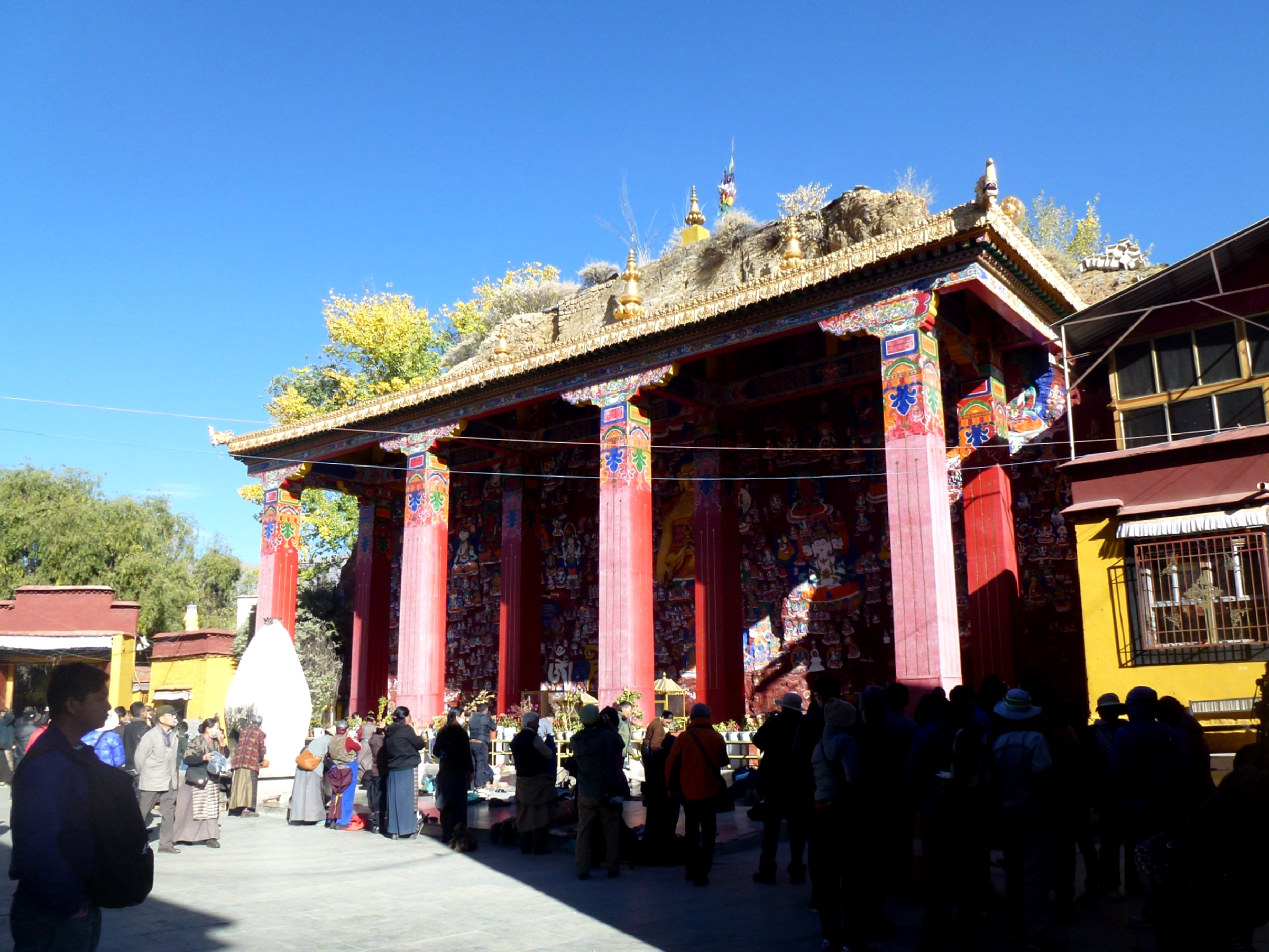 Yaowangshan Lhasa Tibet China 西藏 拉萨 药王山